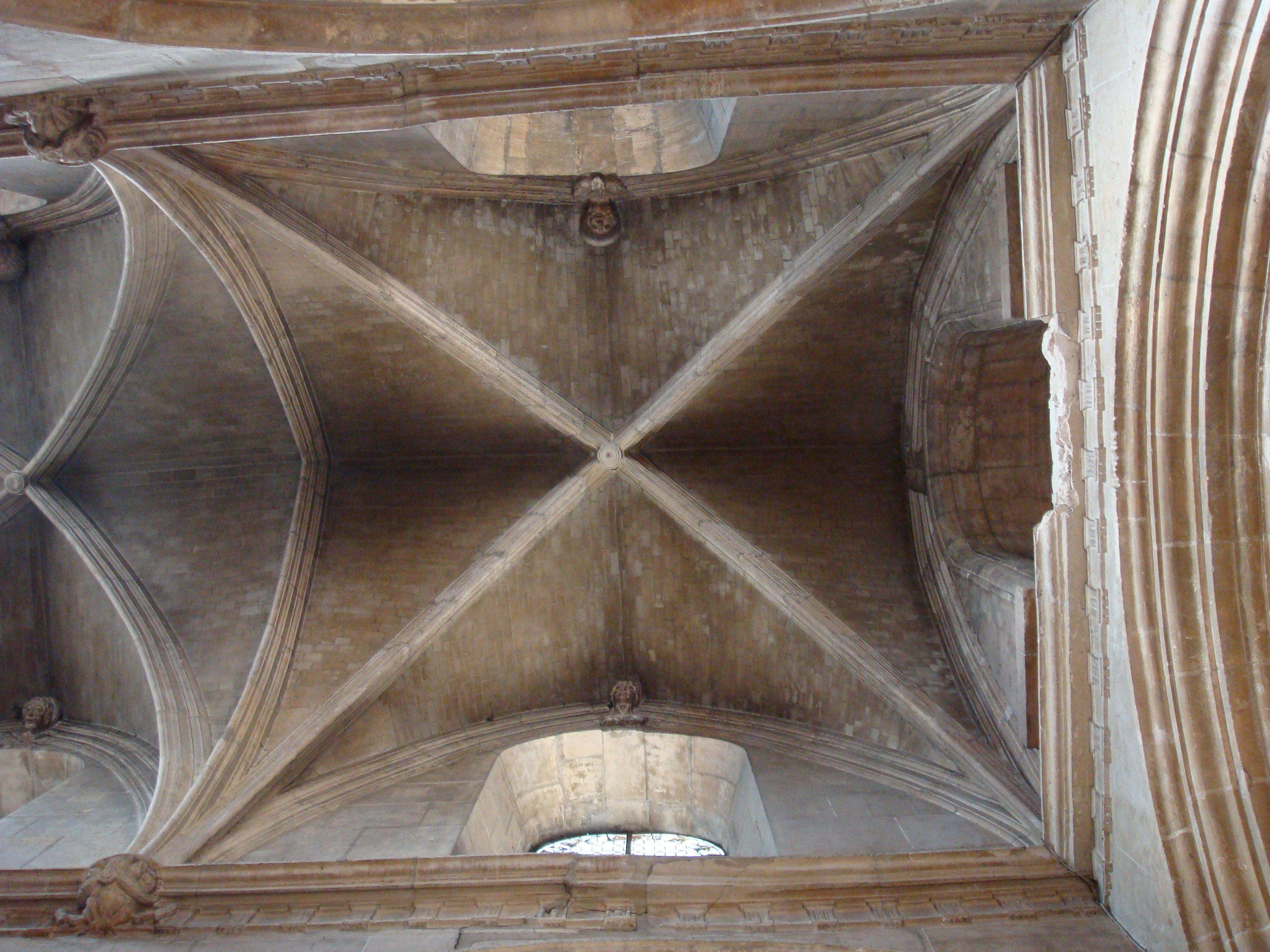 Croisé d'ogives de la voûte du transept; à remarquer des têtes sculptés au-dessus des baies vitrés. Au murs des transepts, au niveau des bas-côtés, les pilastres sont remplacés par des cul-de-lampe, au niveau de la frise en triglyphe. Au transept, au niveau supérieur la petite baie vitré de la nef est remplacée par une petite arcade.